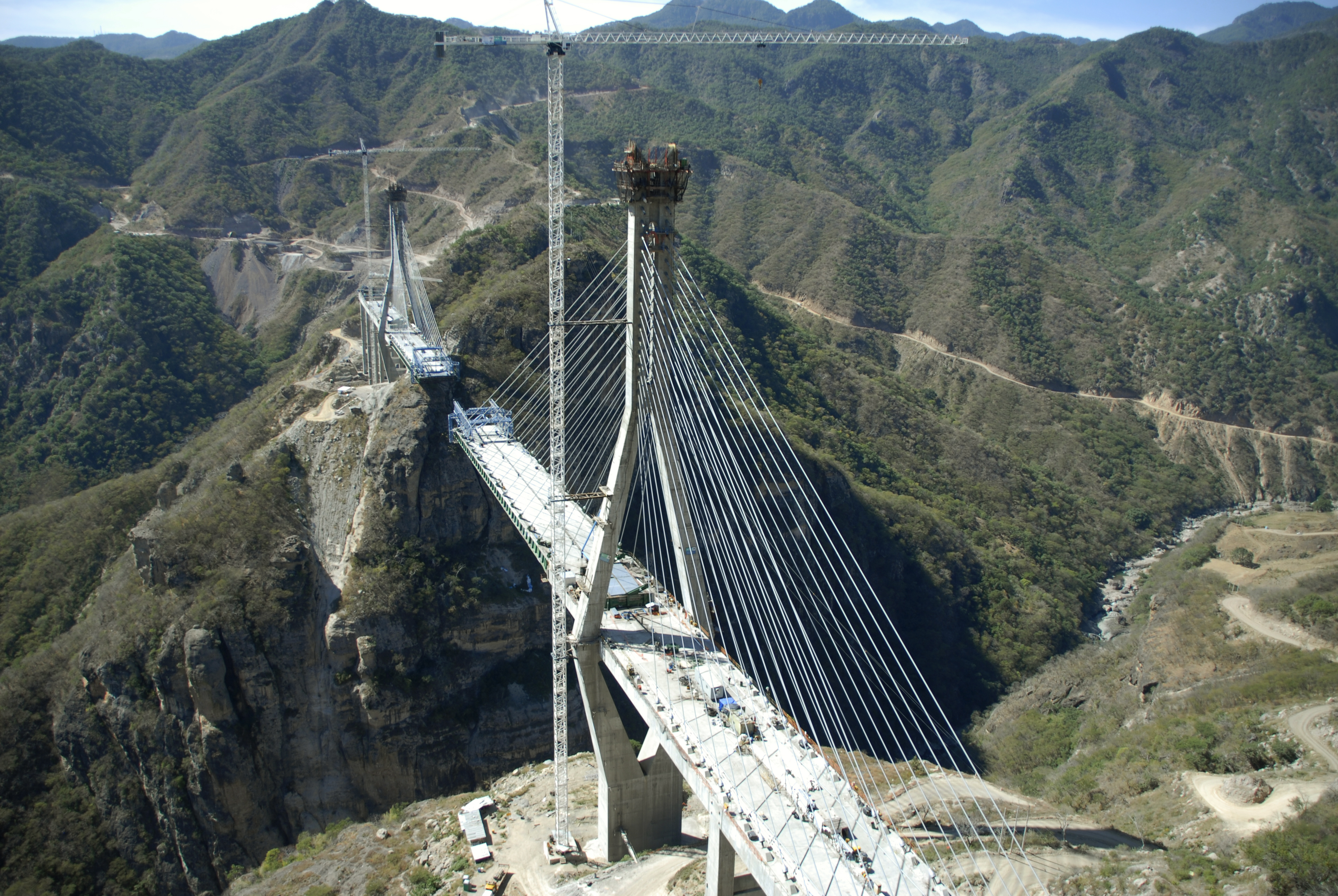 Fotografía del Puente Baluarte y el Arpa de sus tirantes.